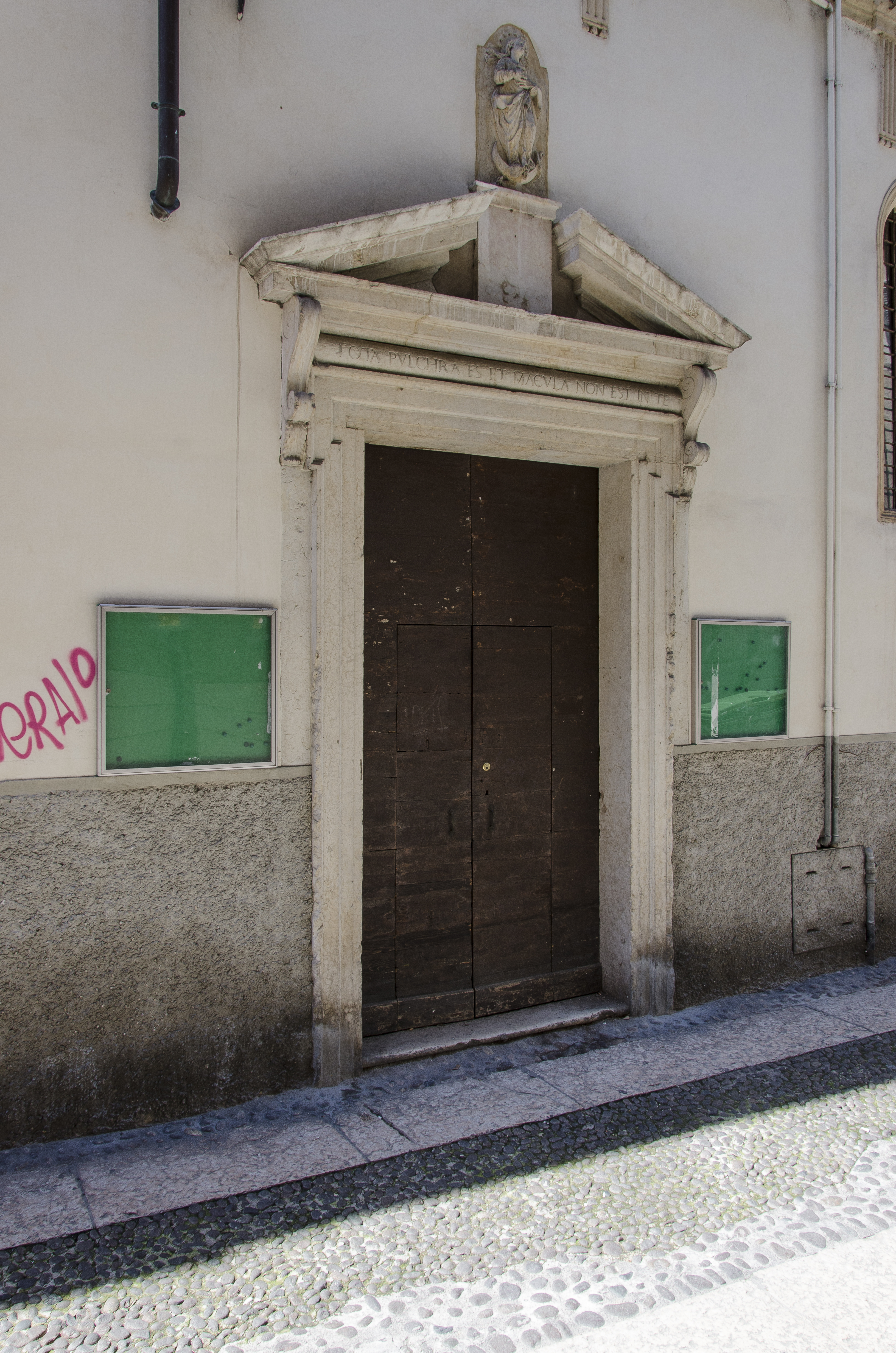 Portale d'ingresso della chiesa di Santa Maria in Chiavica